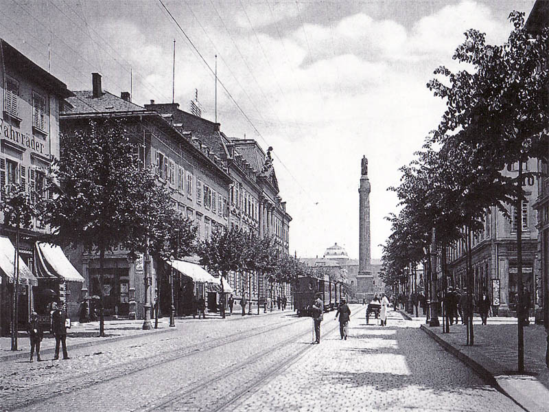 Blick von der Rheinstrasse auf den Luisenplatz gegen Ende des 19. Jhdt.